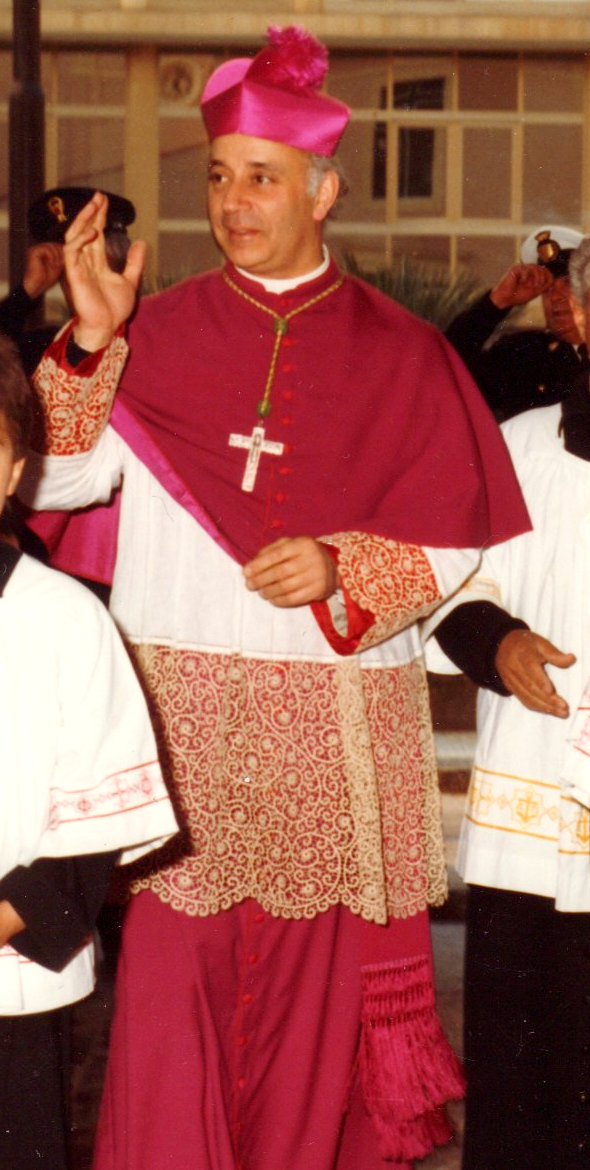 S.E. monsignor Pio Vittorio Vigo